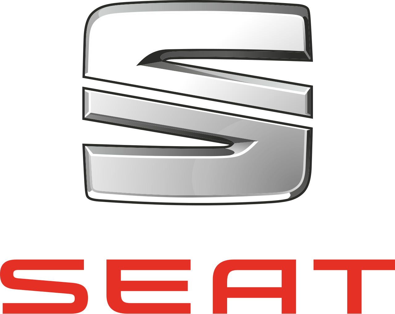 SEAT